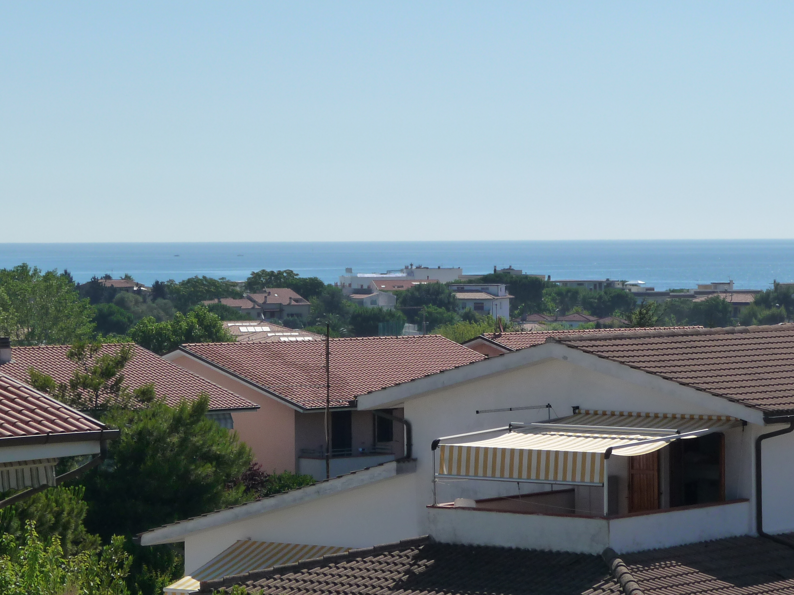 Vista di Marcelli, frazione di Numana (AN), Italia.